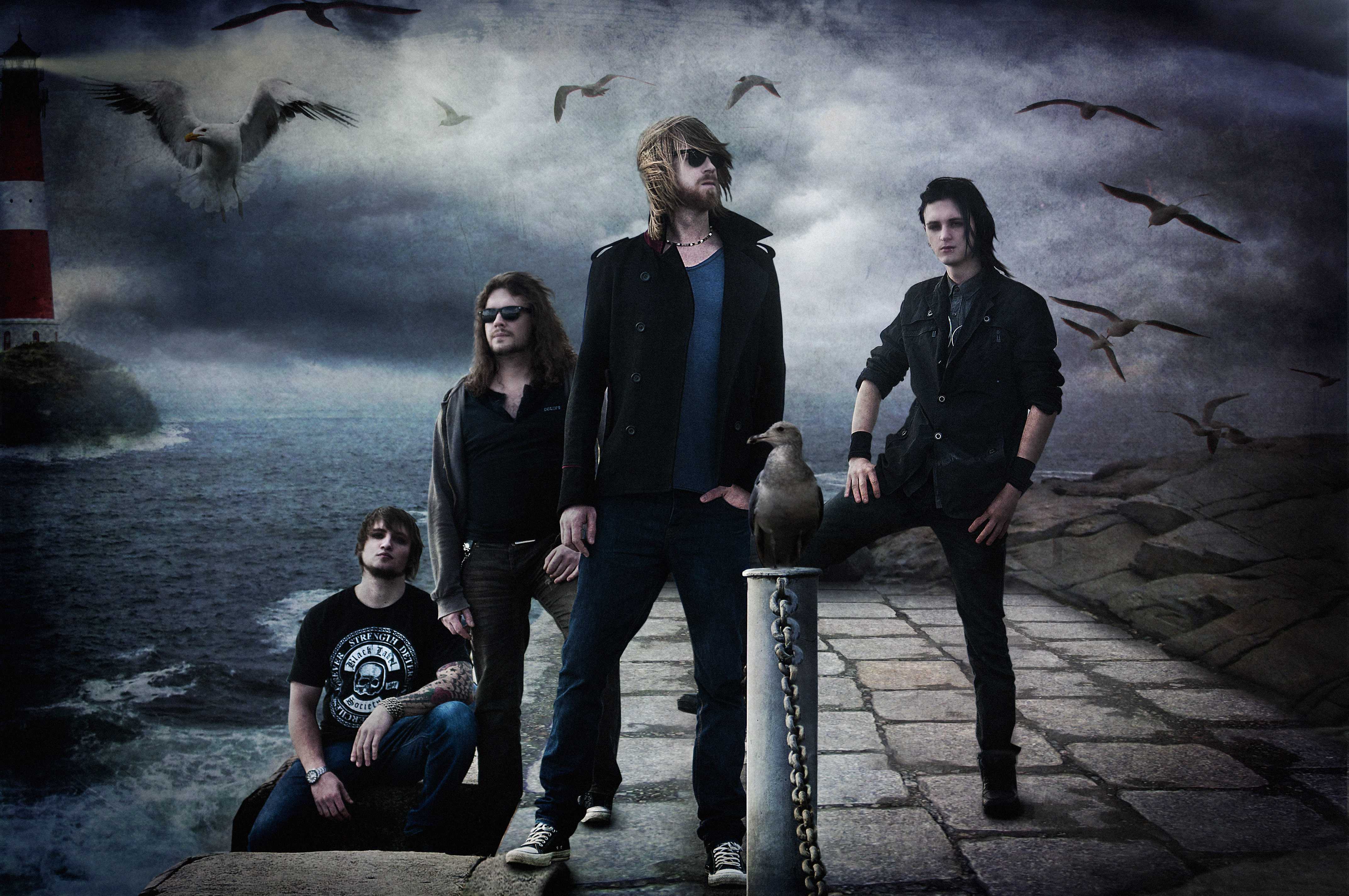 Российская рок-группа «АРДА», 2013 год